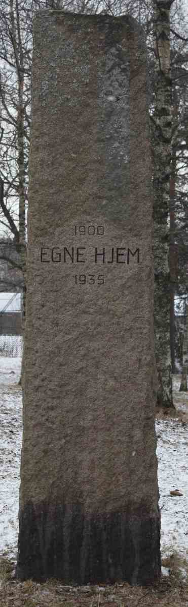 Egne Hjem 1900_1935, minnesmerke i Bjerkelunden